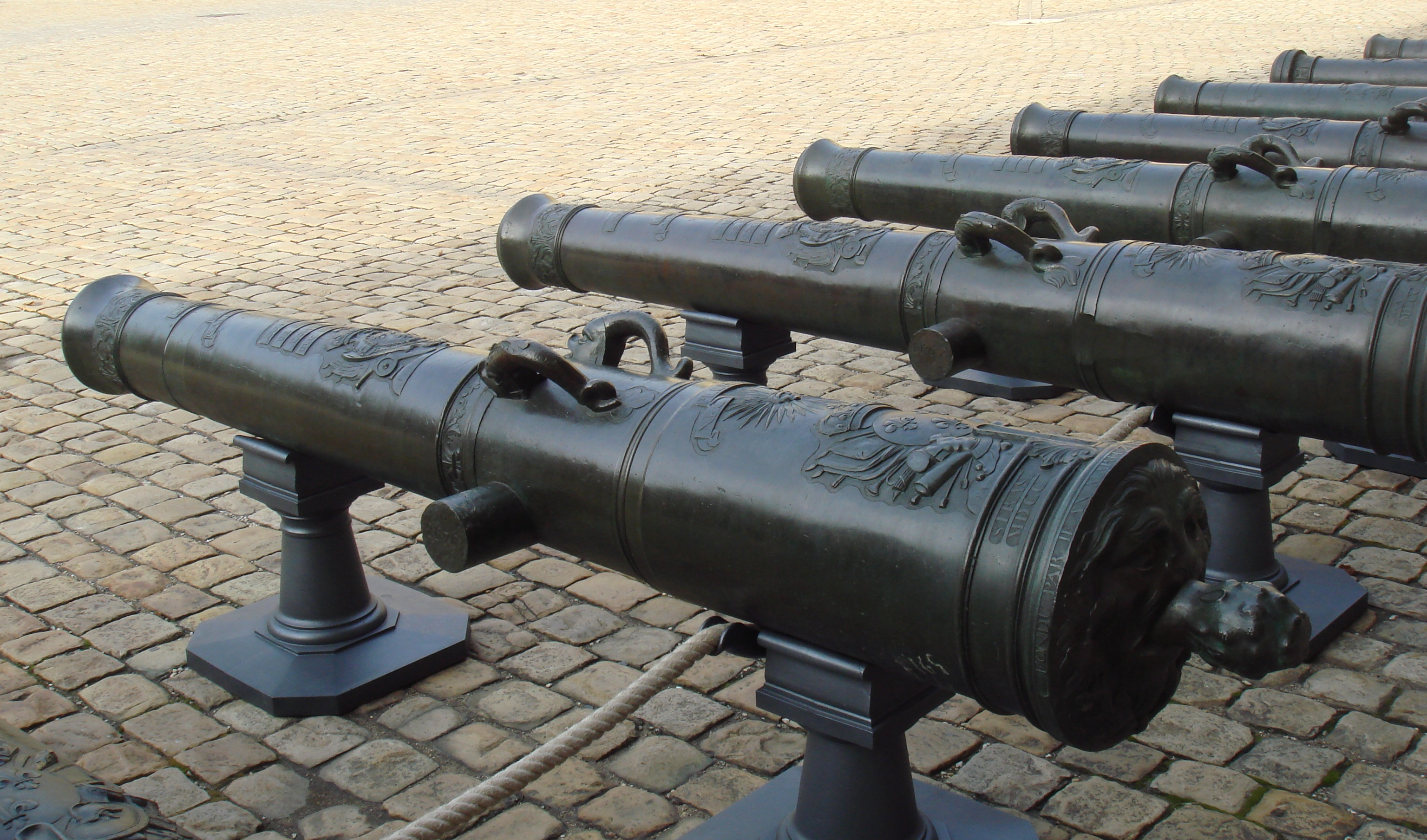 Jean_Maritz_cannons de 24. De Vallière 24-pdr guns.